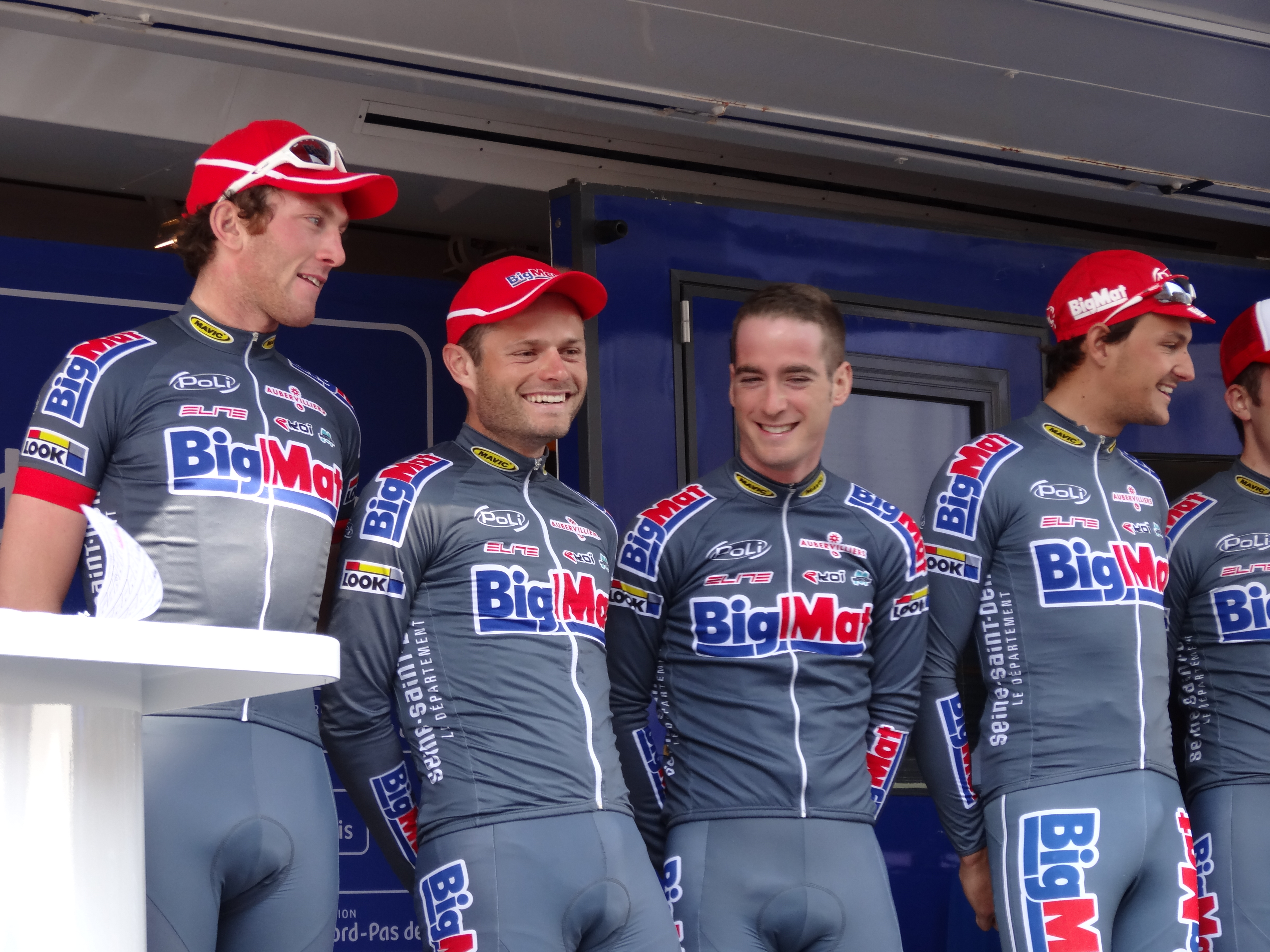 Reportage photographique réalisé le mercredi 1er mai 2013 au départ de la première étape de l'édition 2013 des Quatre jours de Dunkerque à Dunkerque, Nord, Nord-Pas-de-Calais, France. Le dossier photographique montre des véhicules de course exposés, la caravane publicitaire, la présentation des coureurs, et le départ. Depicted people: Romain Bacon, Steven Tronet, Théo Vimpère and Dimitri Le Boulch